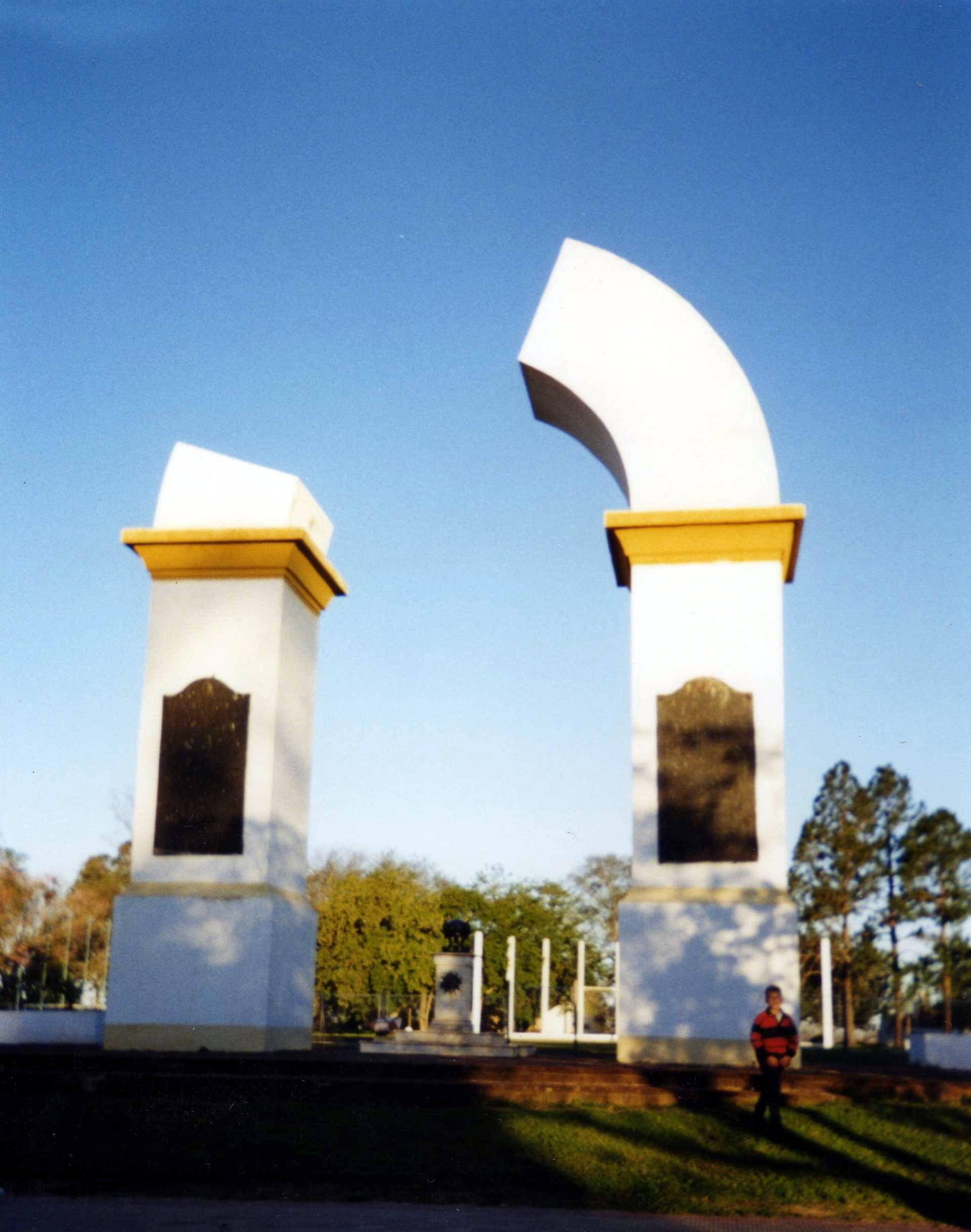 Arco Trunco en homenaje a los caídos en Malvinas, en la localidad argentina de Yapeyú, Corrientes.